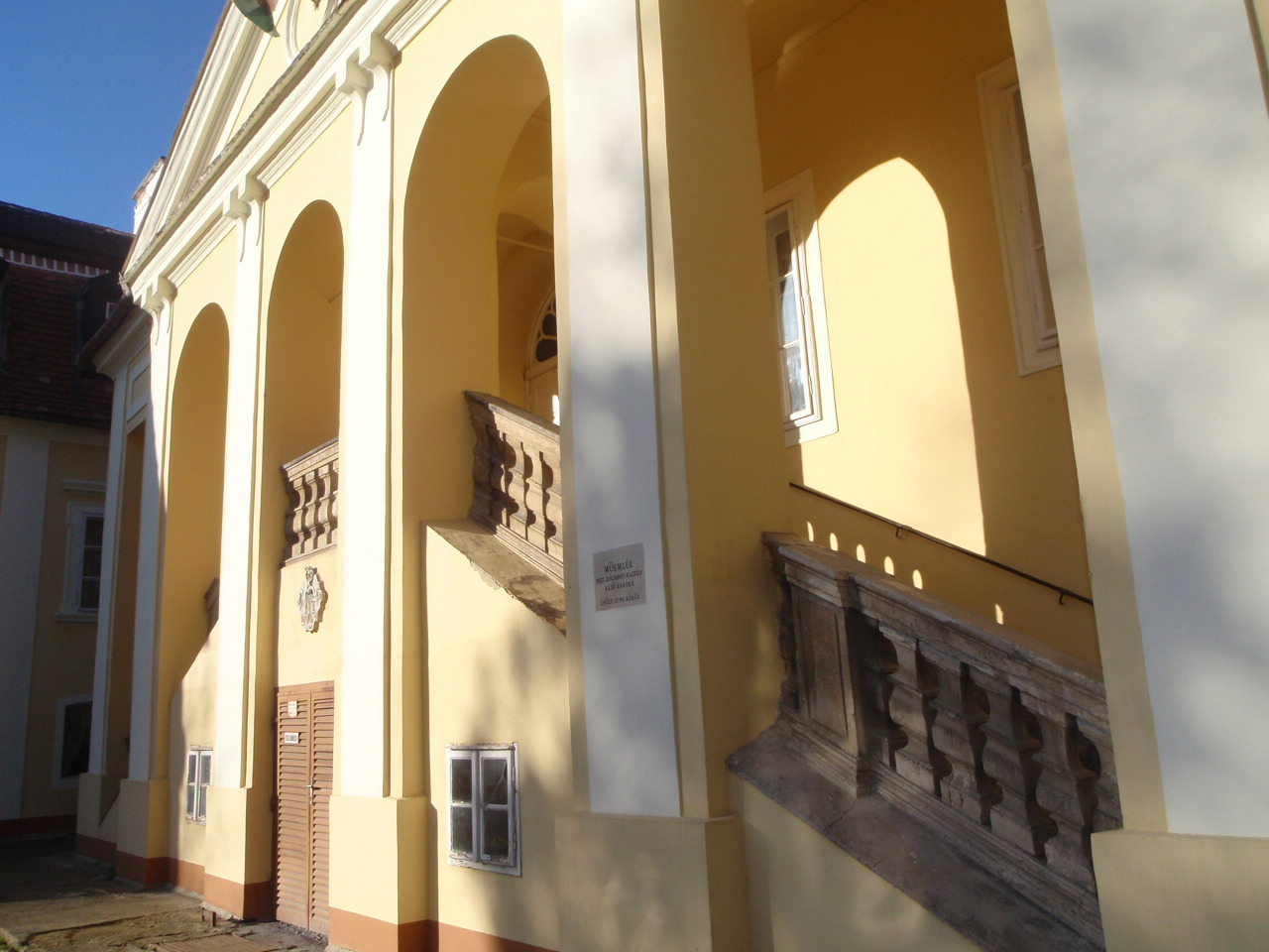 Peresznye kastély főhomlokzat